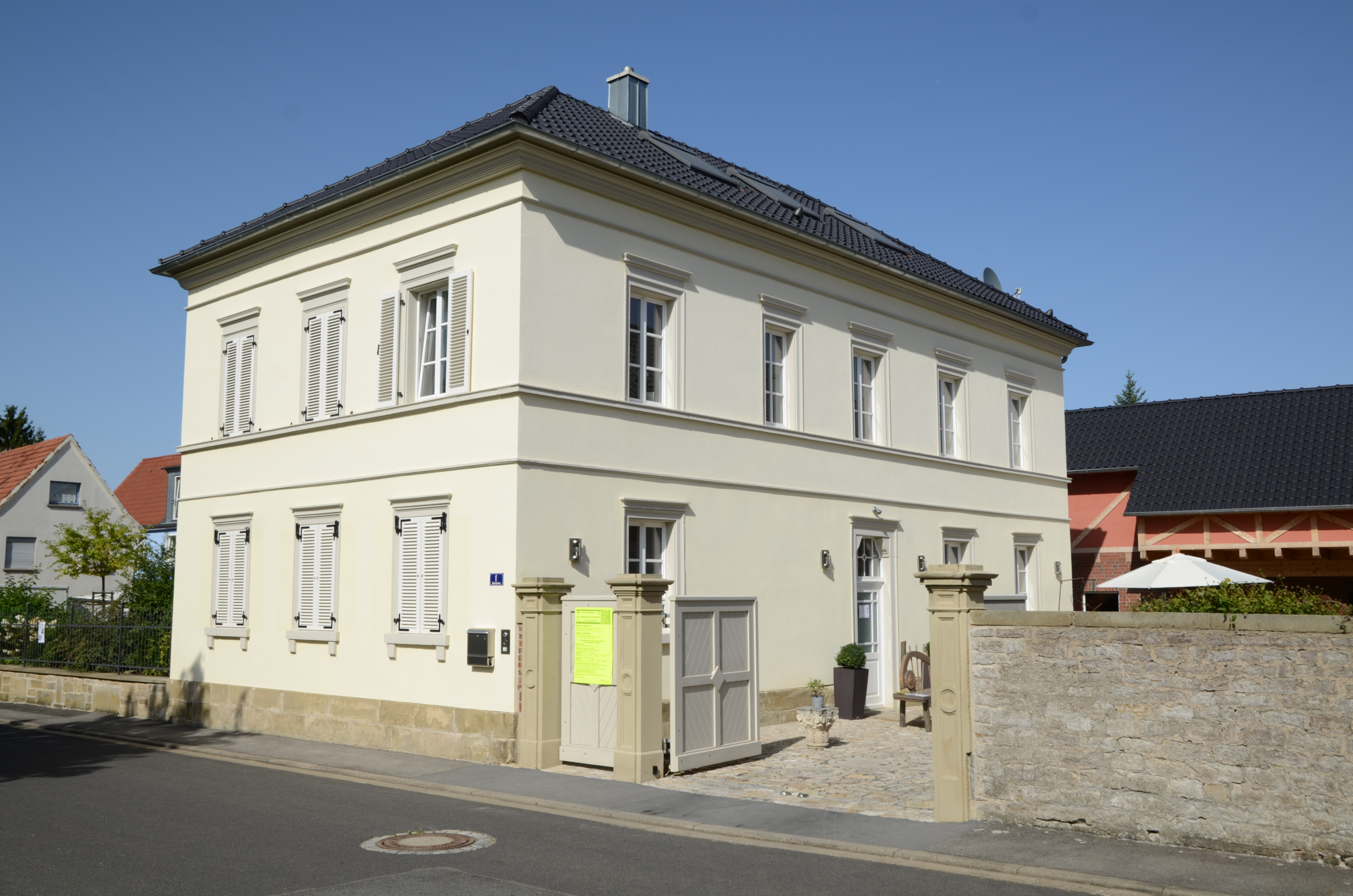 Schwanfeld Jägergasse 1